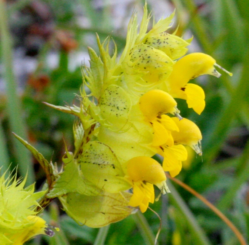 Rhinanthus_alpinus (Cresta di gallo alpina) Località : Passo di Falzarego, Cortina (BL), 2105 m s.l.m.